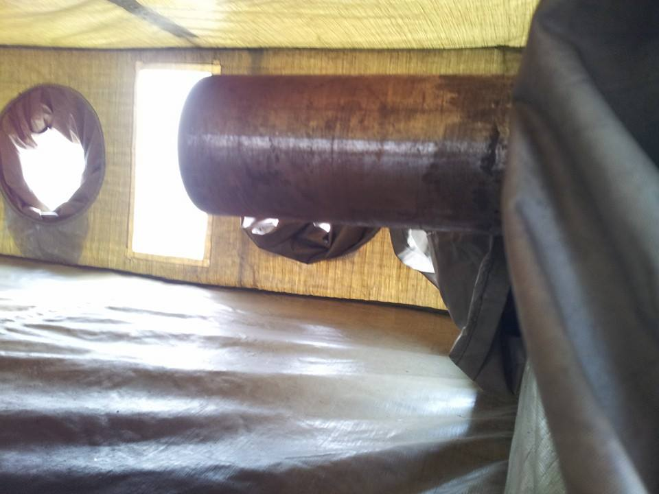 Widok wewnątrz komory grupowej KG-12 (piecyk)